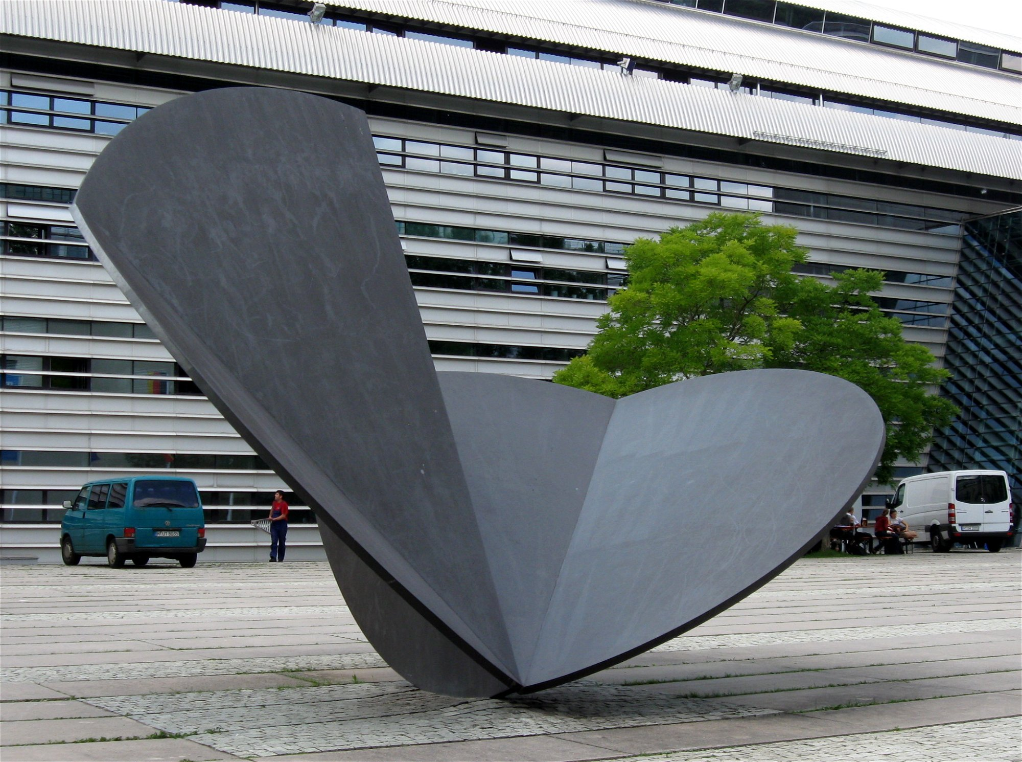 Fritz Koenig: Große Blattfigur, 1996, TU München